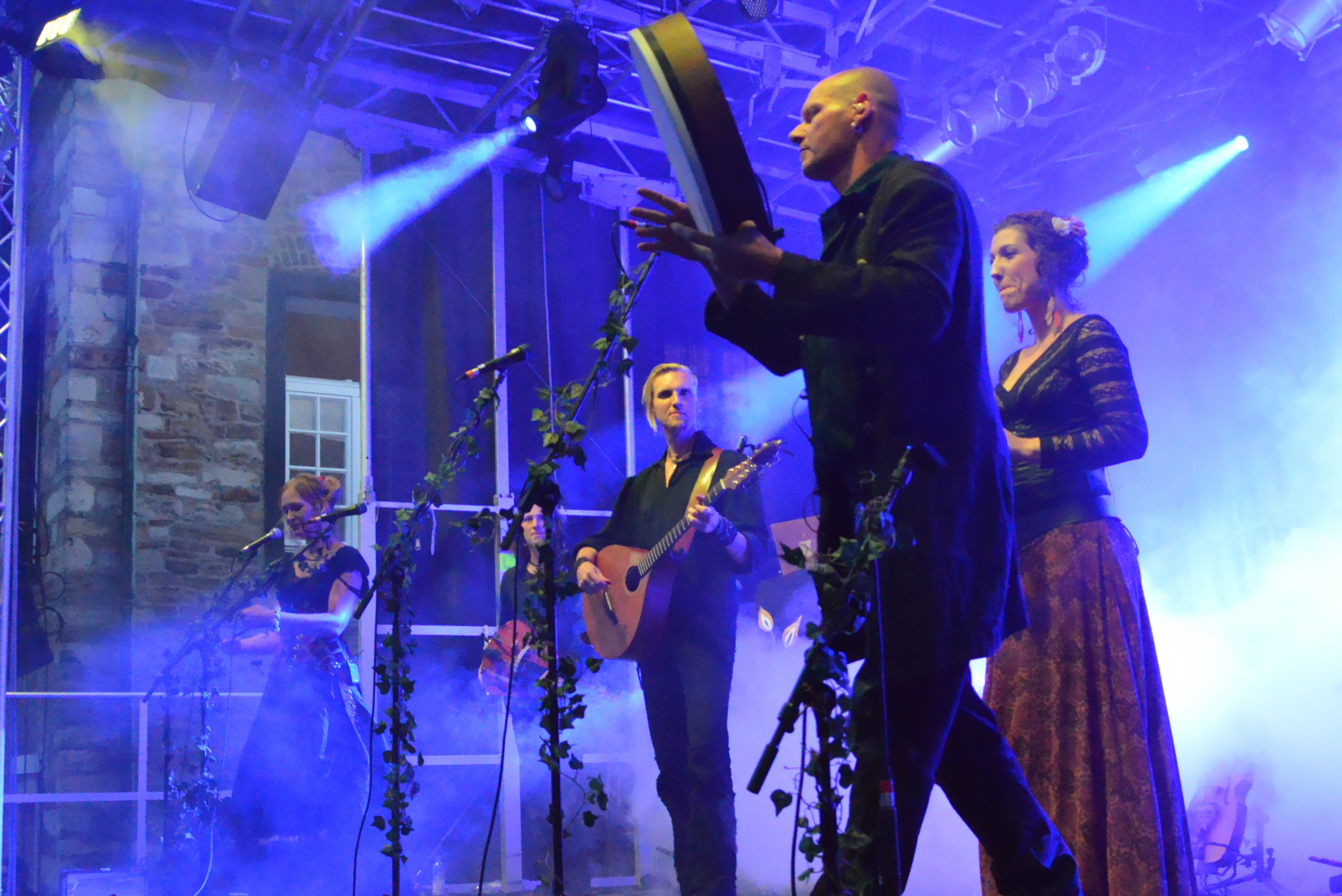 Faun beim Burgfolk Festival 2013 auf Schloß Broich